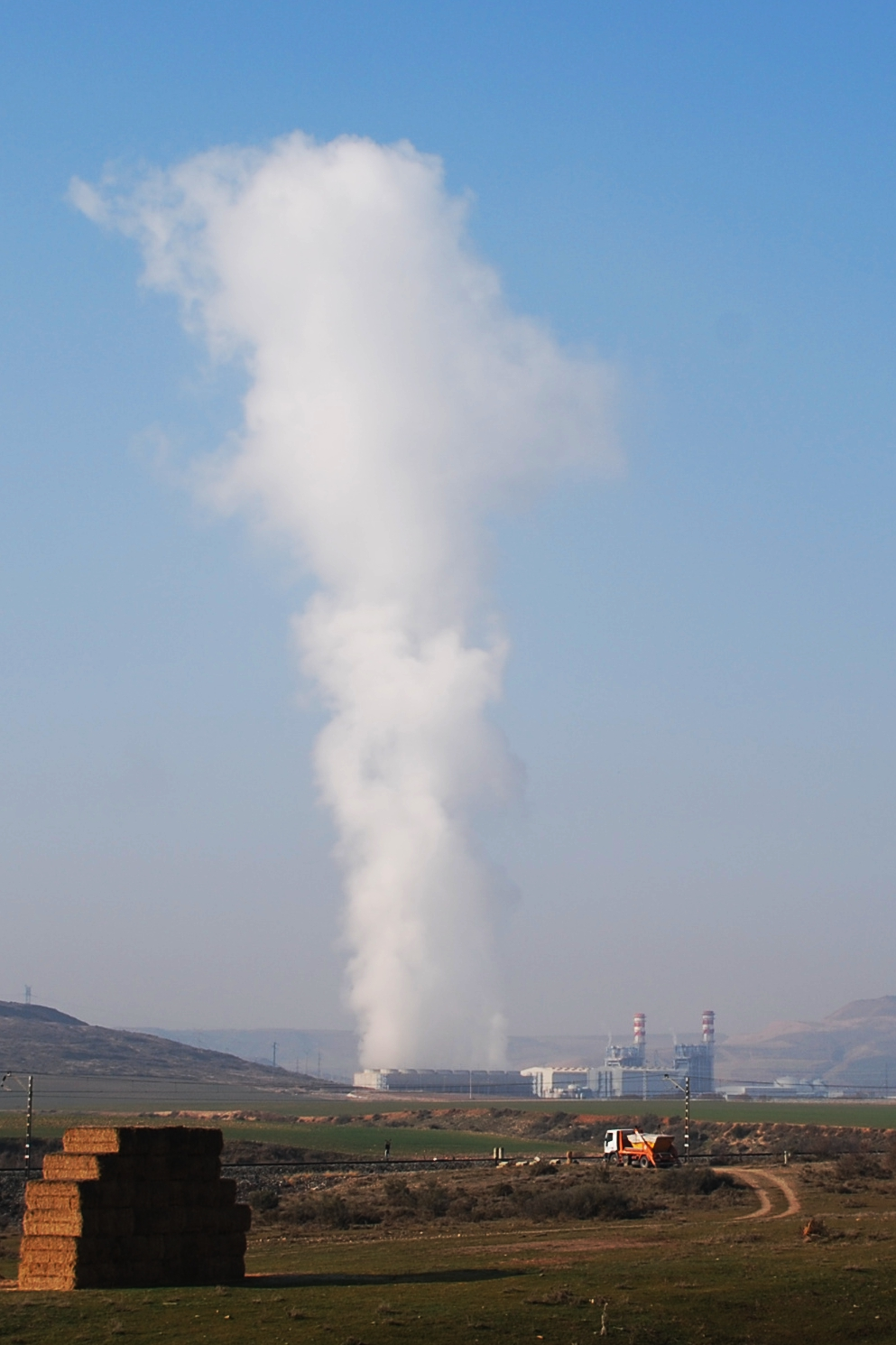 Central térmica de Arrúbal, La Rioja (España).